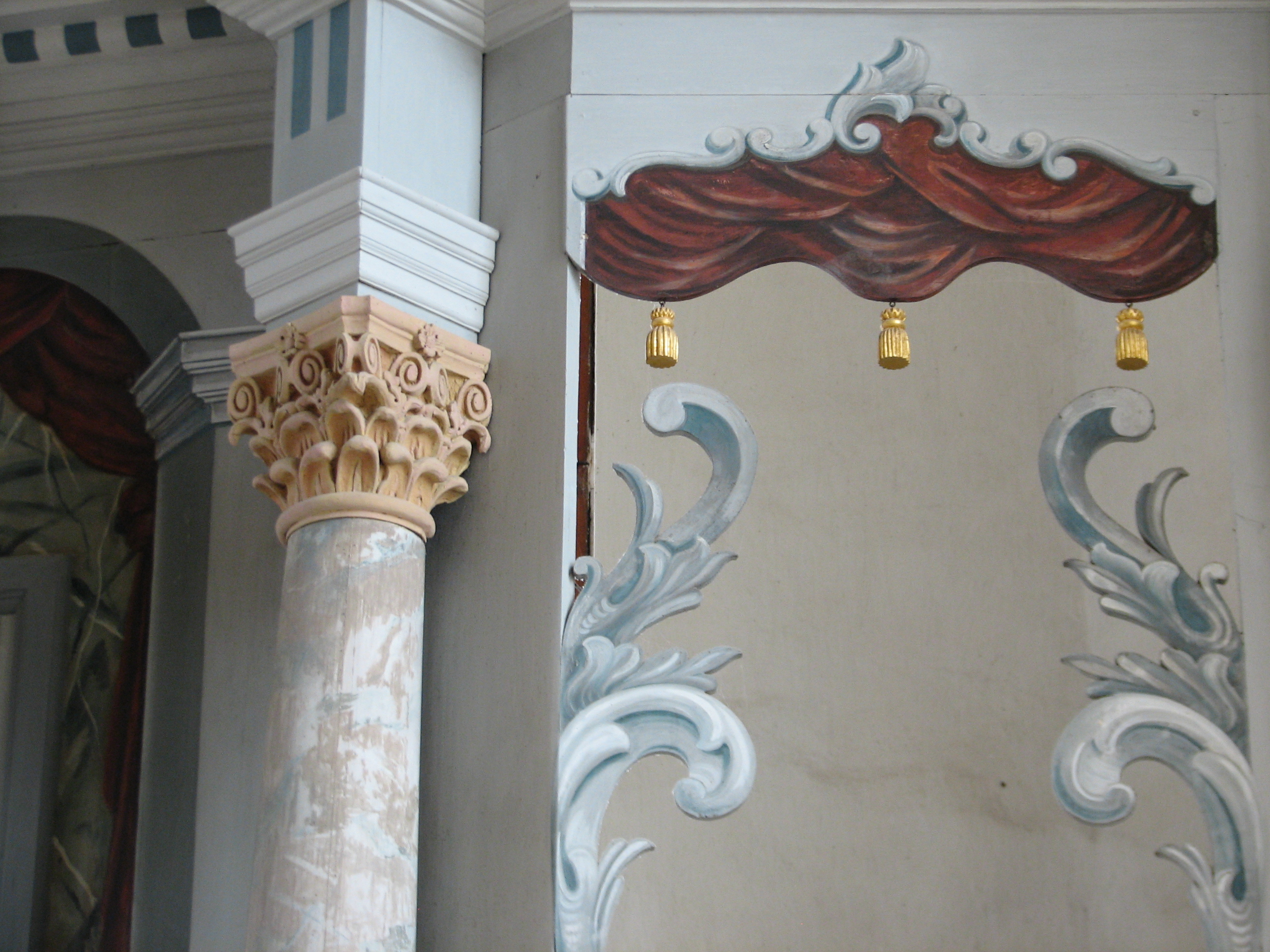 Altar-Detail